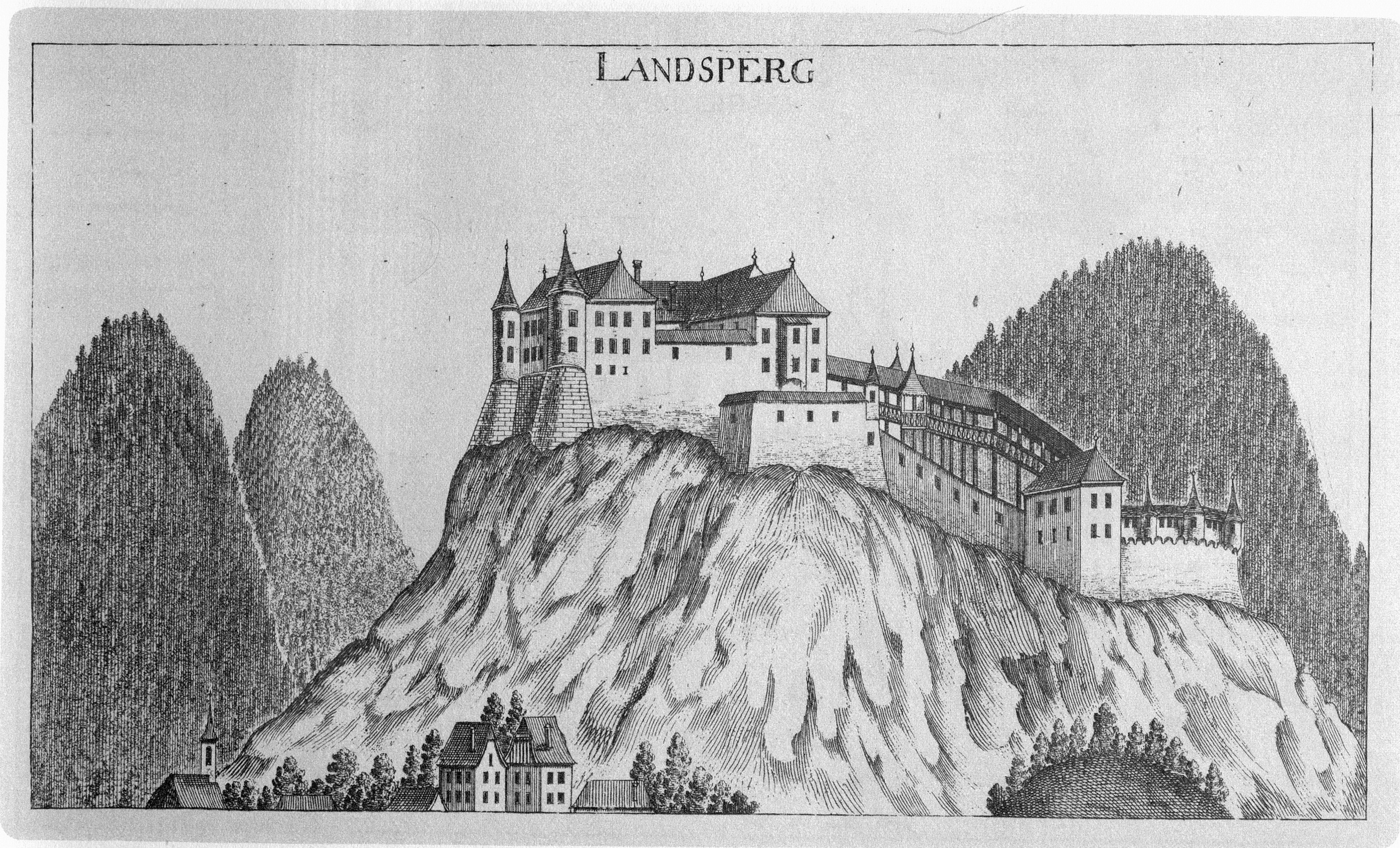 G. M. Vischers Käyserlichen Geographi, Topographia Ducatus Stiriae, Das ist: Eigentliche Delineation / und Abbildung aller Städte / Schlösser / Marcktfleck / Lustgärten / Probsteyen / Stiffter / Clöster und Kirchen / so es sich im Herzogthumb Steyrmarck befinden; Und anjetzo Umb einen billichen Preyß zu finden seynd Bey Johann Bitsch Universitäts Buchhandlern / Auff dem Juden=Platz bey der guldenen Saulen. Graz 1681 Die Nummerierung der Dateien folgt der alphabetischen Reihung der Ortsnamen und entspricht nicht dem Vischer-Register